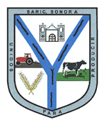 Escudo del municipio sonorense.